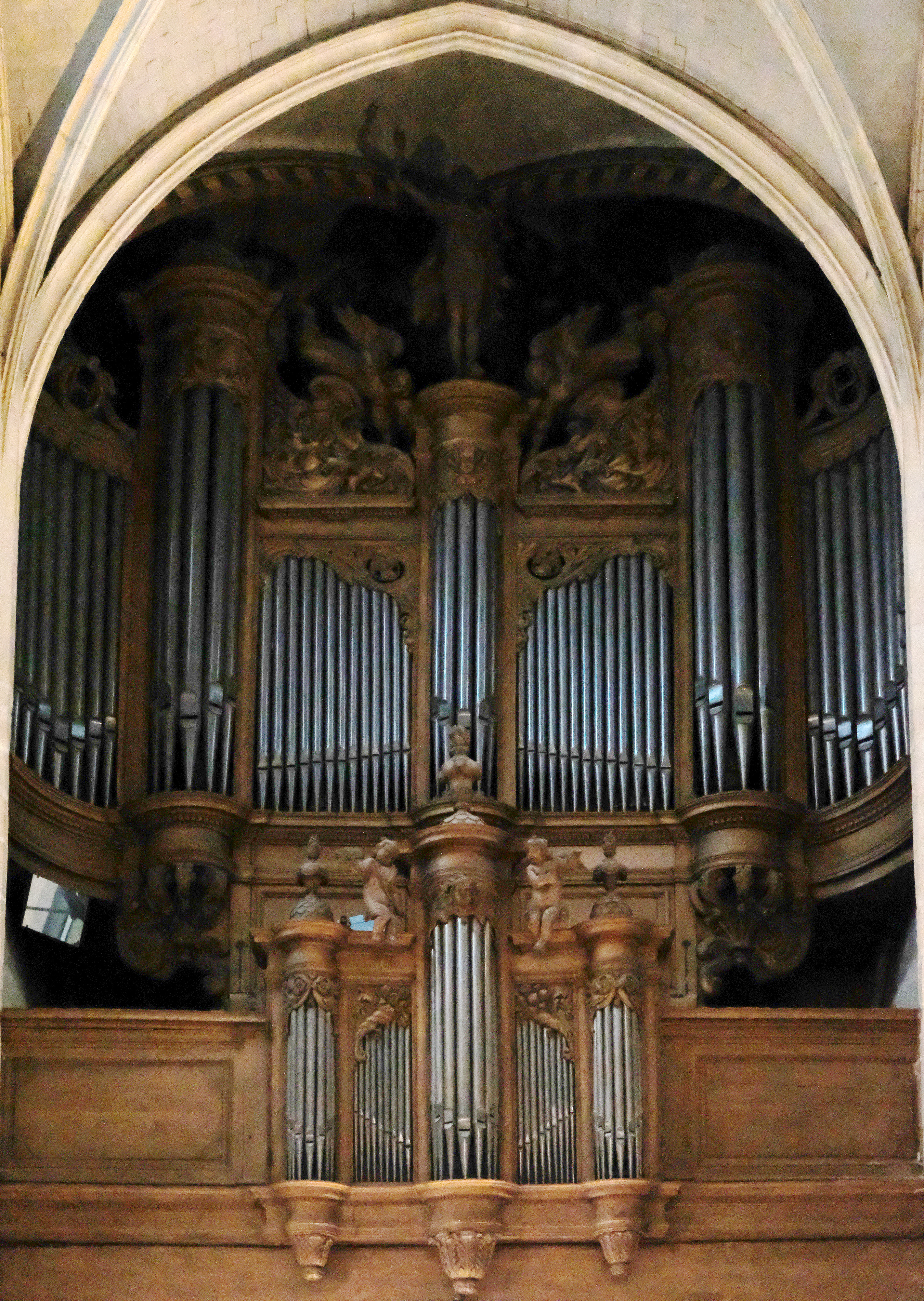 Église Saint-Médard (orgue de tribune) - Paris V